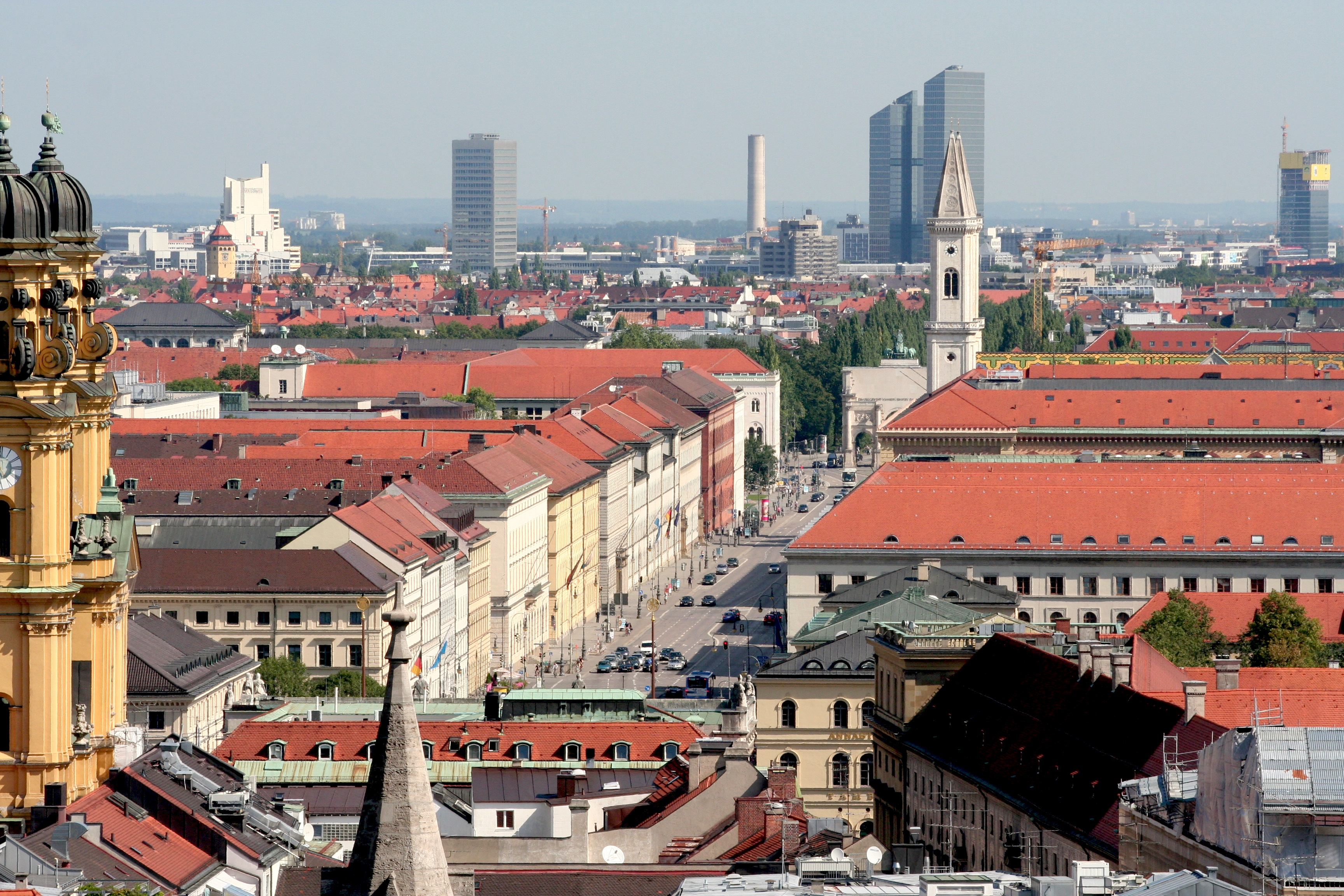 Ludwigstraße von oben